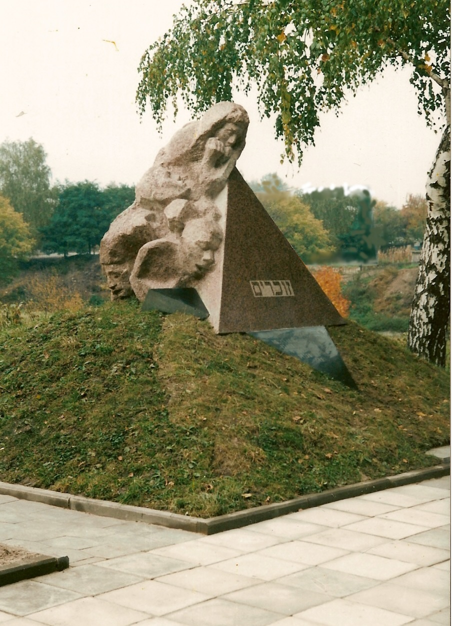 Denkmal für die Opfer des Faschismus auf dem Massengrab für die im 2. Weltkrieg erschossenen Juden, Bildhauer Josef Tabachnyk